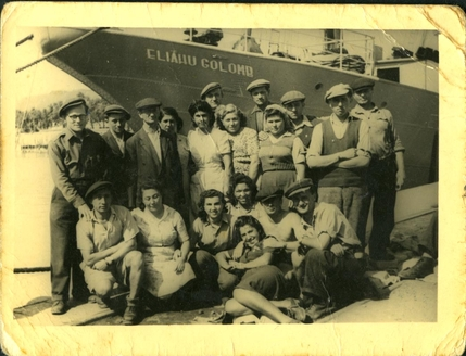 מעפילים ליד אוניית המעפילים אליהו גולומב, 1946